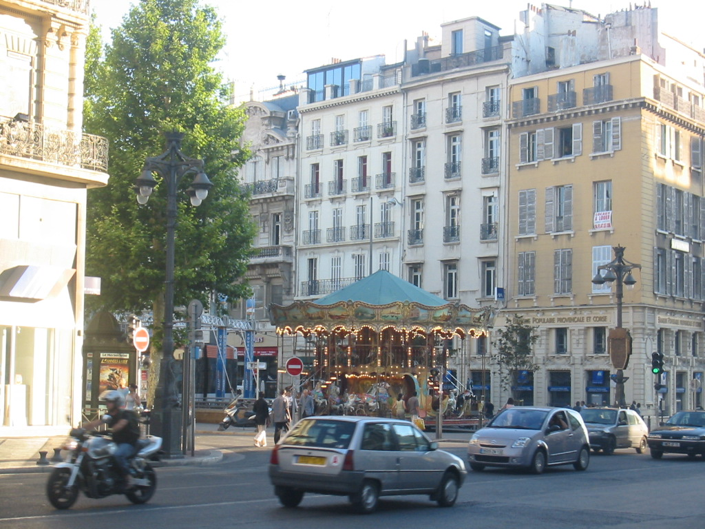 The place du Général de Gaulle in Marseille, France. Source: Jaakko Sakari Reinikainen (ulayiti)